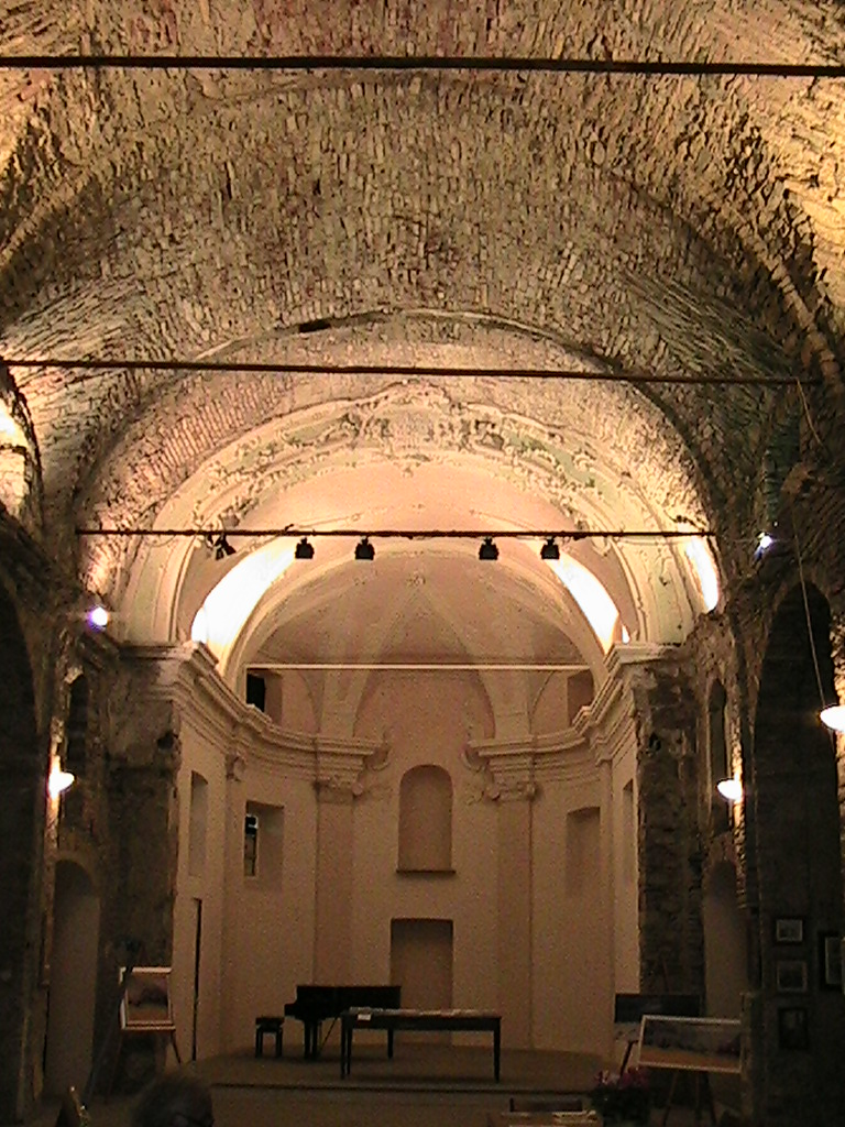 Bardi - Chiesa di San Francesco - interno